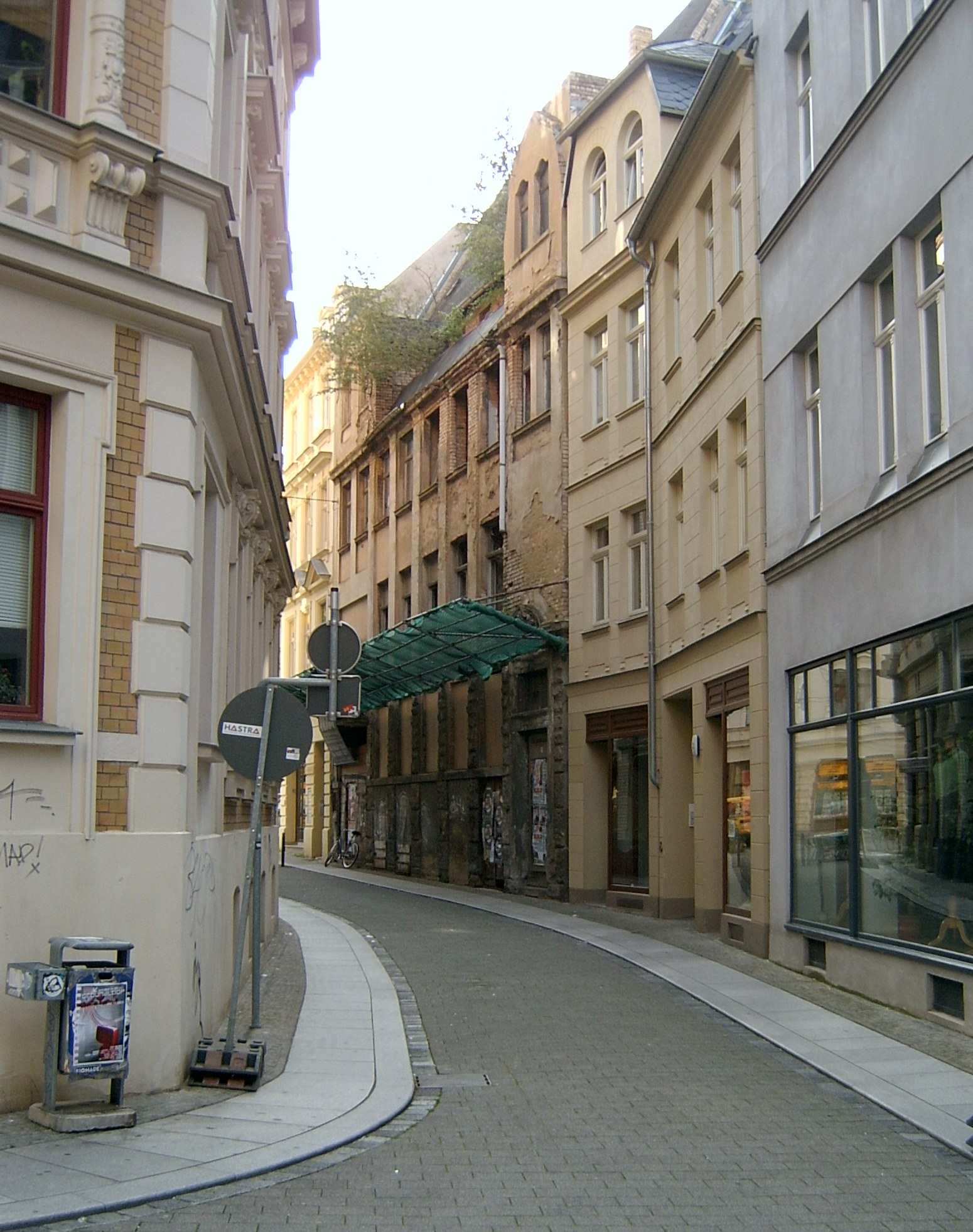 Die Jägergasse in Halle (Saale), Blick von der Kleinen Ulrichstraße.